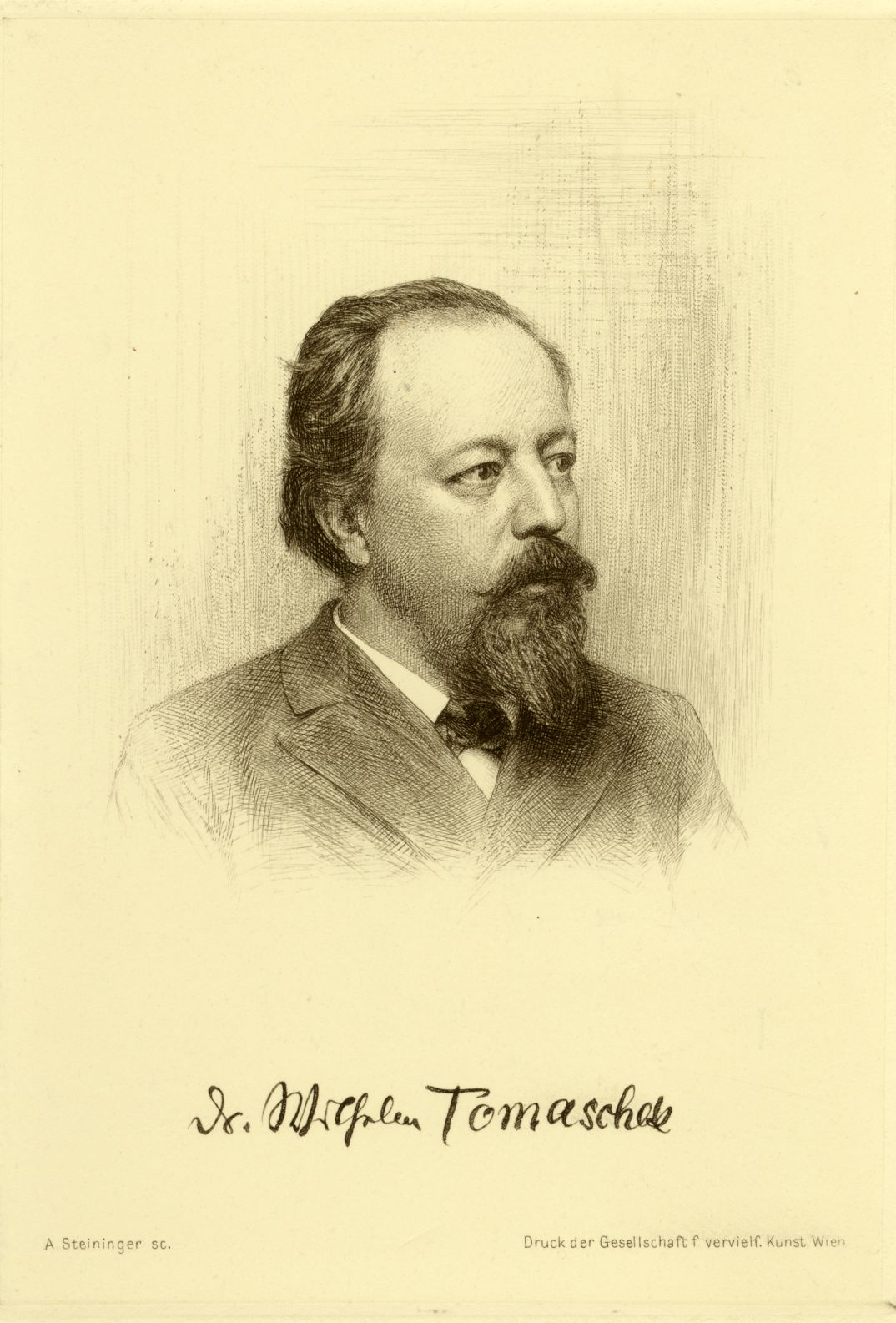 Wilhelm Tomaschek, česko-rakouský historický geograf a orientalista.